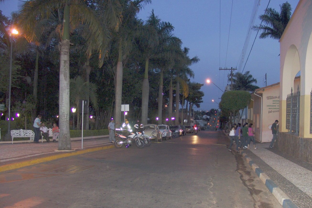 Foto do município de Cesário Lange, São Paulo, Brasil